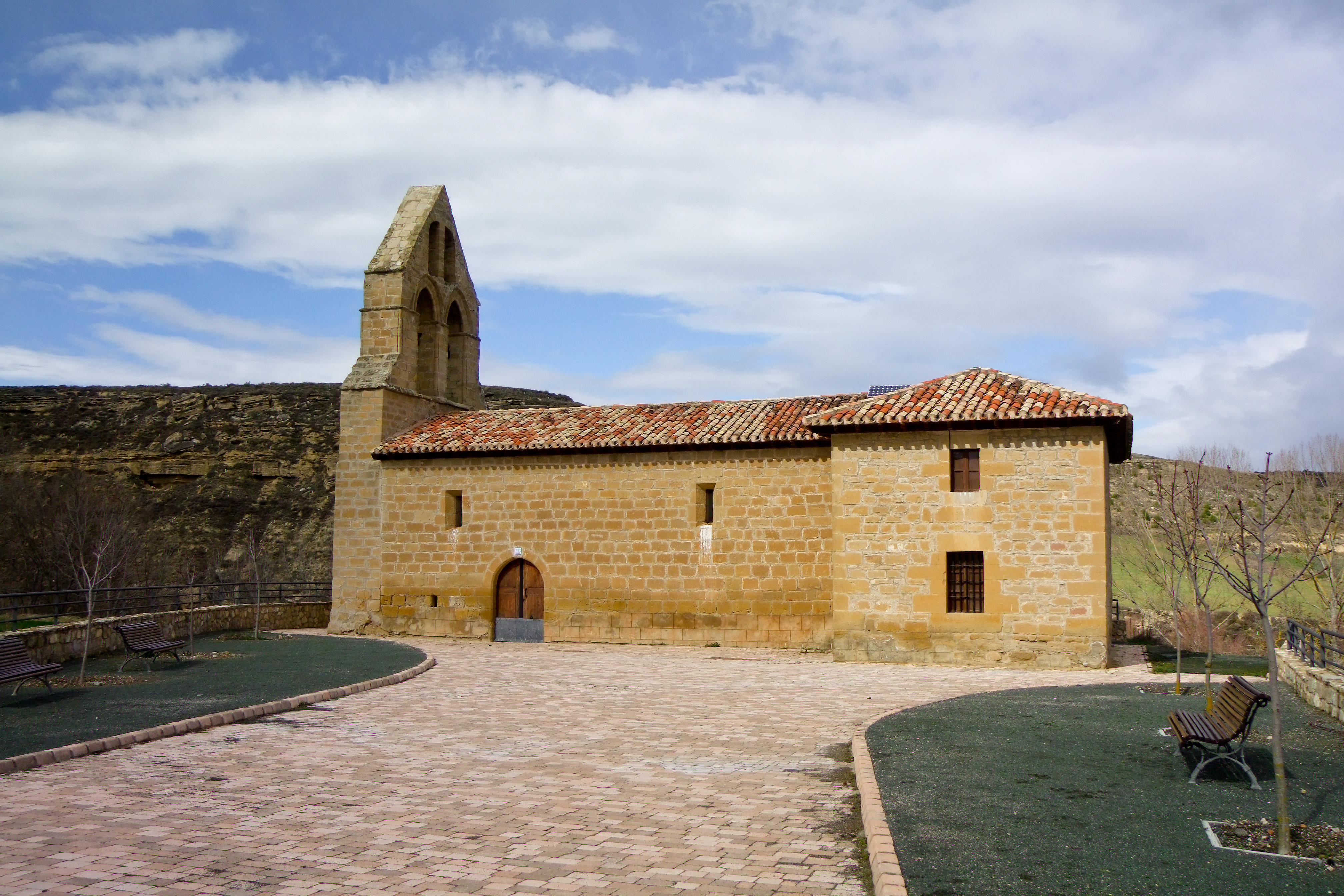 Ermita de Nuestra Señora de Legarda en la localidad de Ochánduri, La Rioja - España